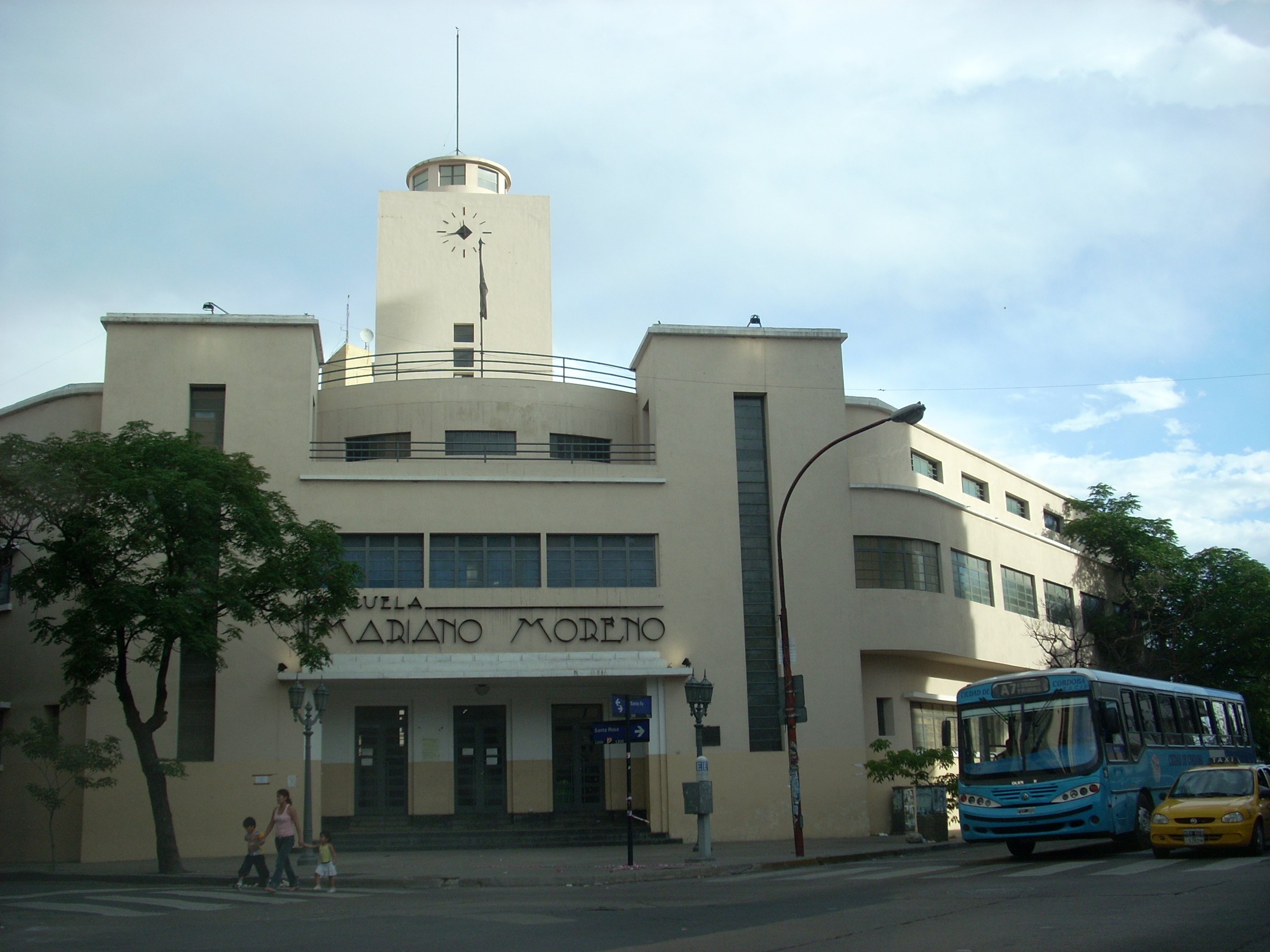 Escuela Mariano Moreno, Barrio Alberdi, Córdoba, Argentina